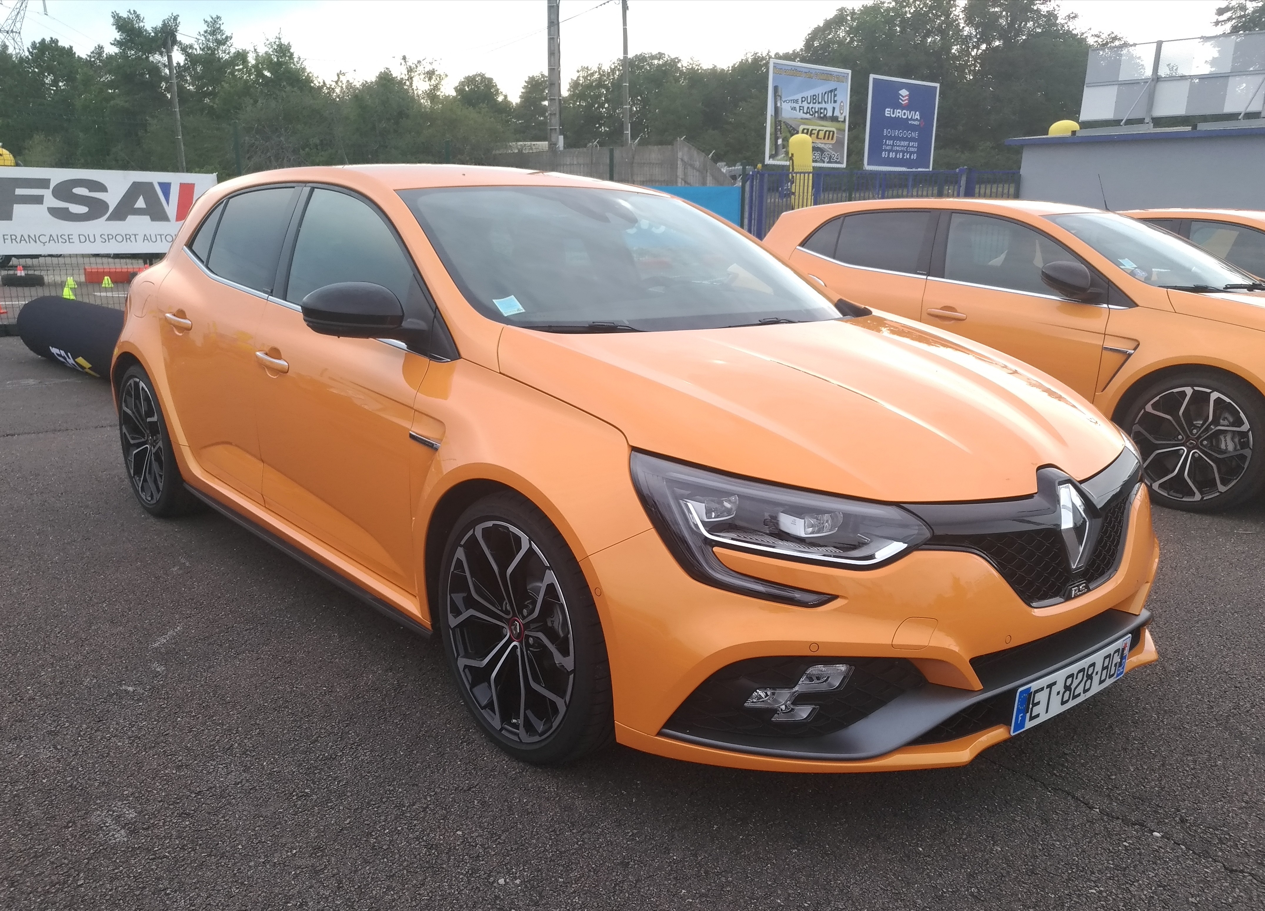 2018 Renault Mégane RS IV (1.8 Tce 280 hp) at Dijon Prenois